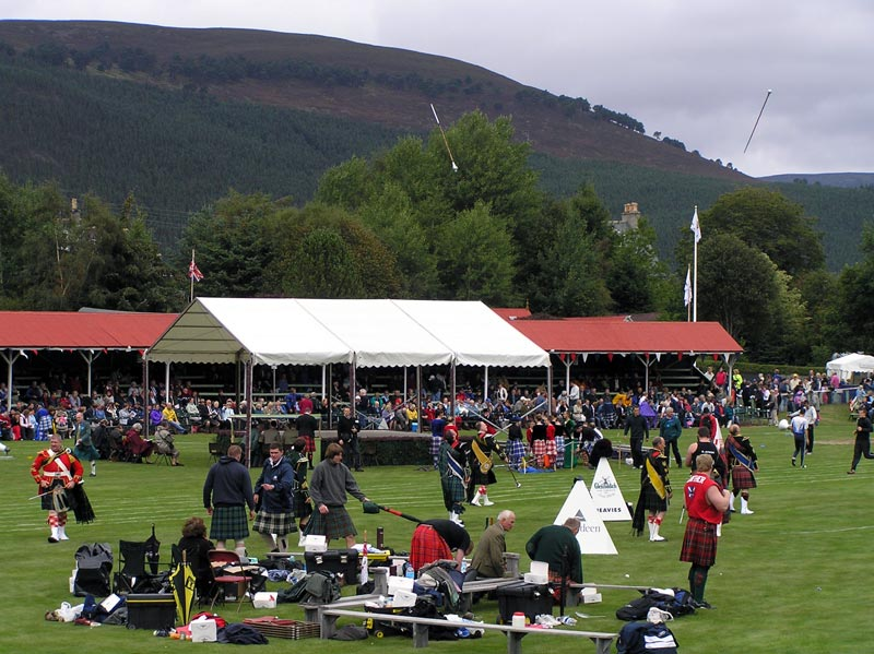 General 'Games Day' view